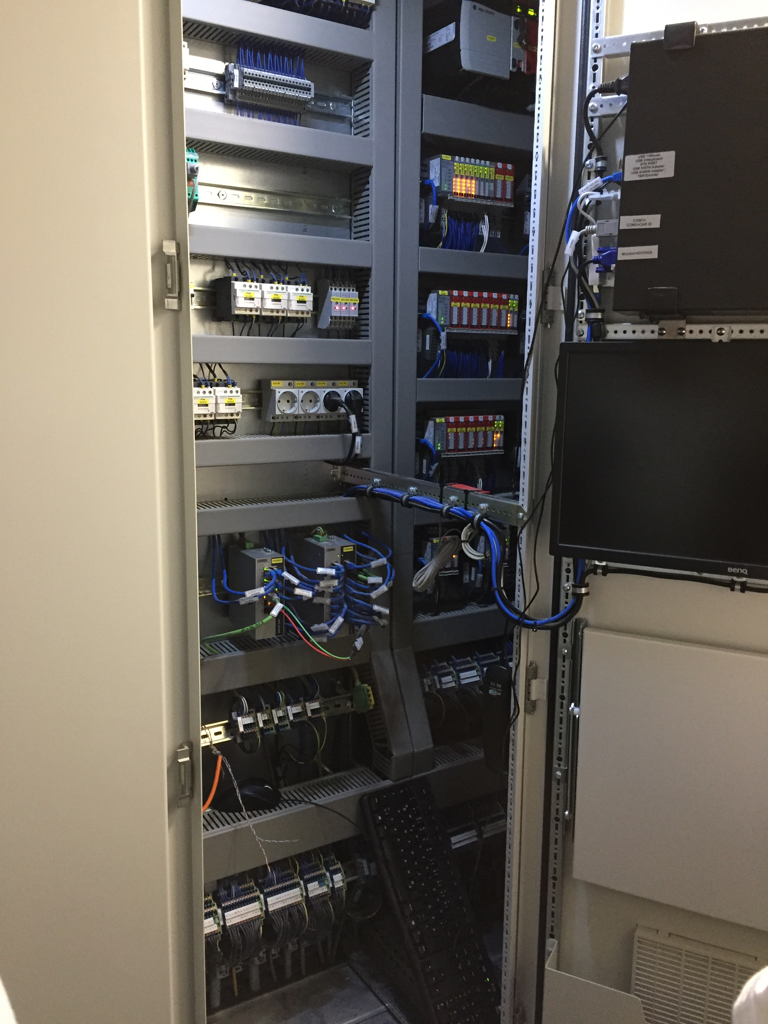 L'une des armoires contenant les systèmes informatiques de contrôle de l'attraction Pégase Express au Parc Astérix, France.